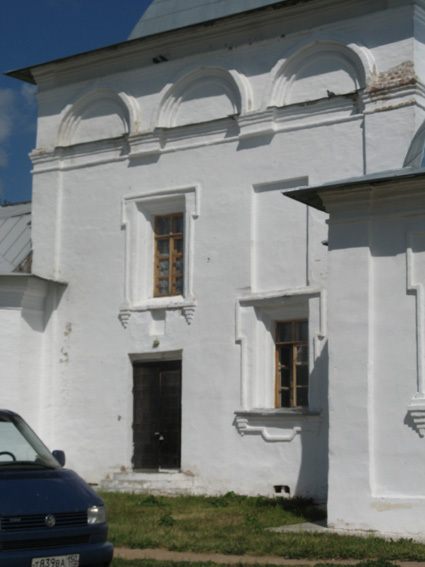 kolocky Monastery. Uspensky Church